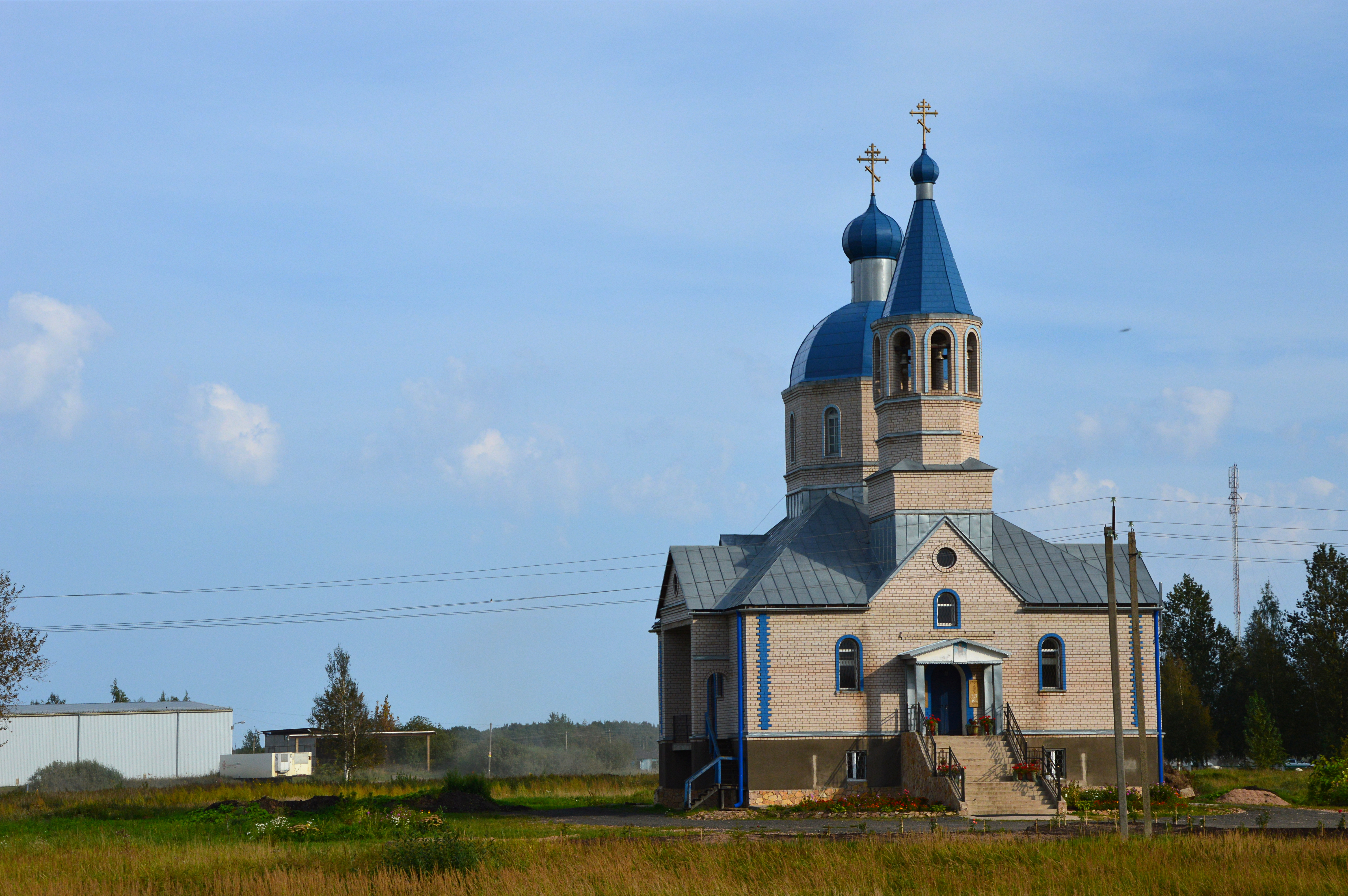 Церковь «Спорительница хлебов» иконы Божией Матери в деревне Лесная.